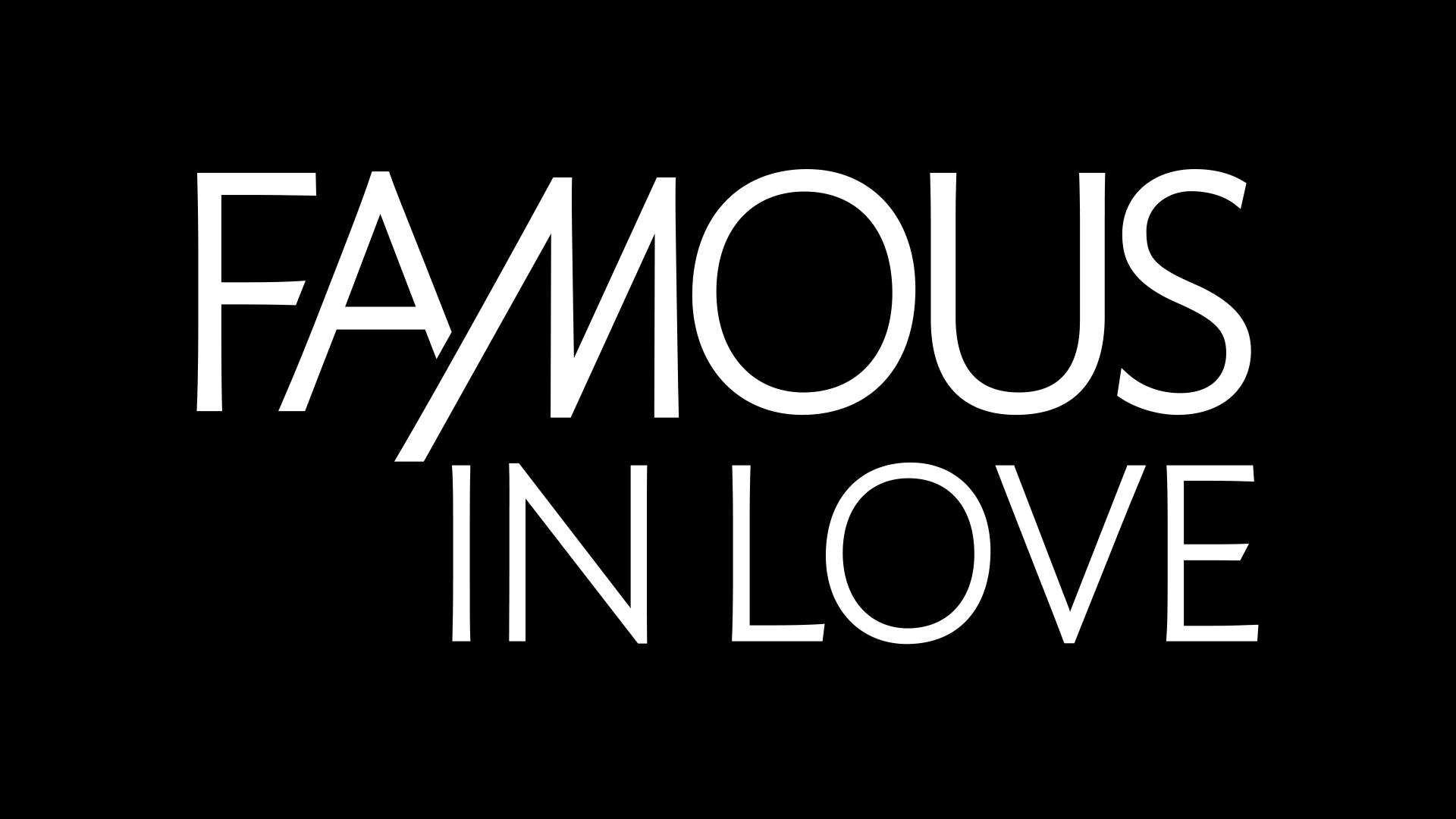 Logo de la série